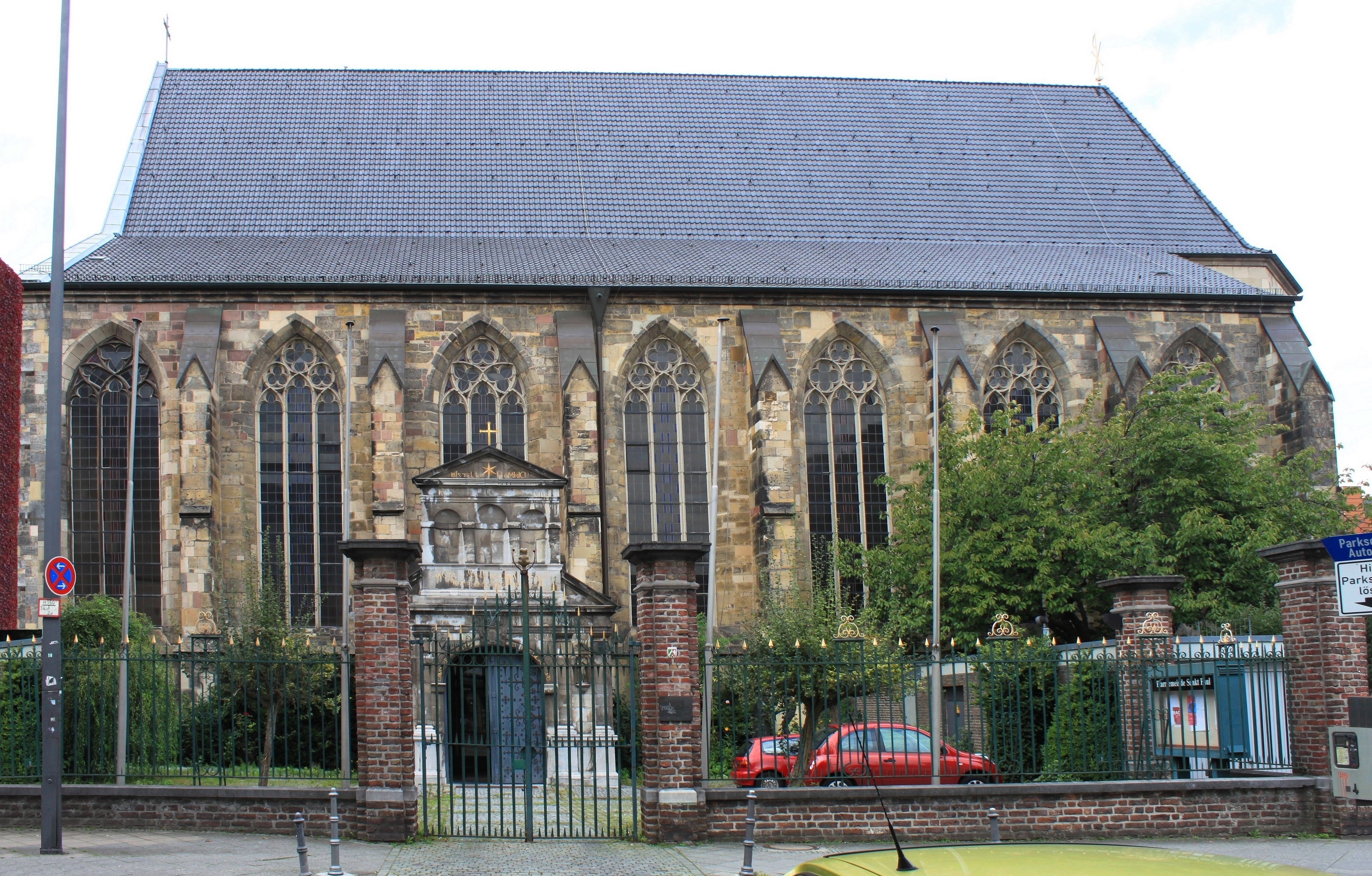 Aachen, ehemalige Dominikanerkirche St. Paul